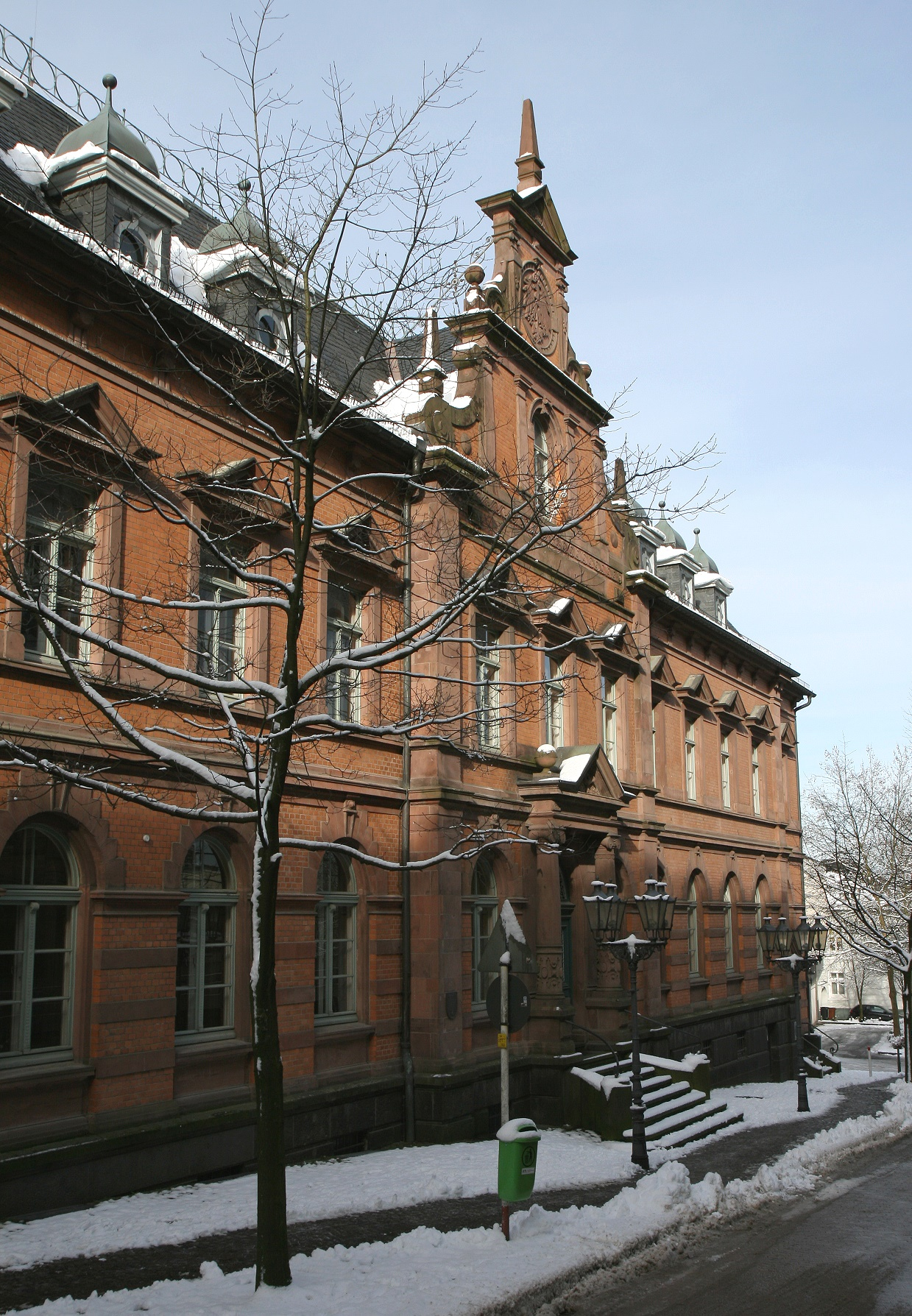 „Alte Post“ in Lüdenscheid, Altenaer Straße 9. 1891 bis 1893 errichtet und seit 9. September 1985 unter Denkmalschutz gestellt.